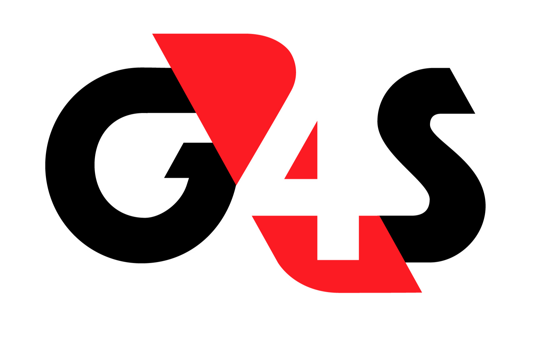 G4S logotyp